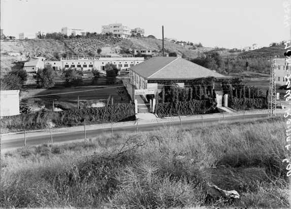 מפעל ארגמן, בדרך ז'בוטינסקי 42, רמת גן. לצידי הכביש מפעל "משי זקס" מפעל "ארגמן" מאחורי וברקע גבעת שאול. הוילה בראש הגבעה היא בית מוריס פישר.